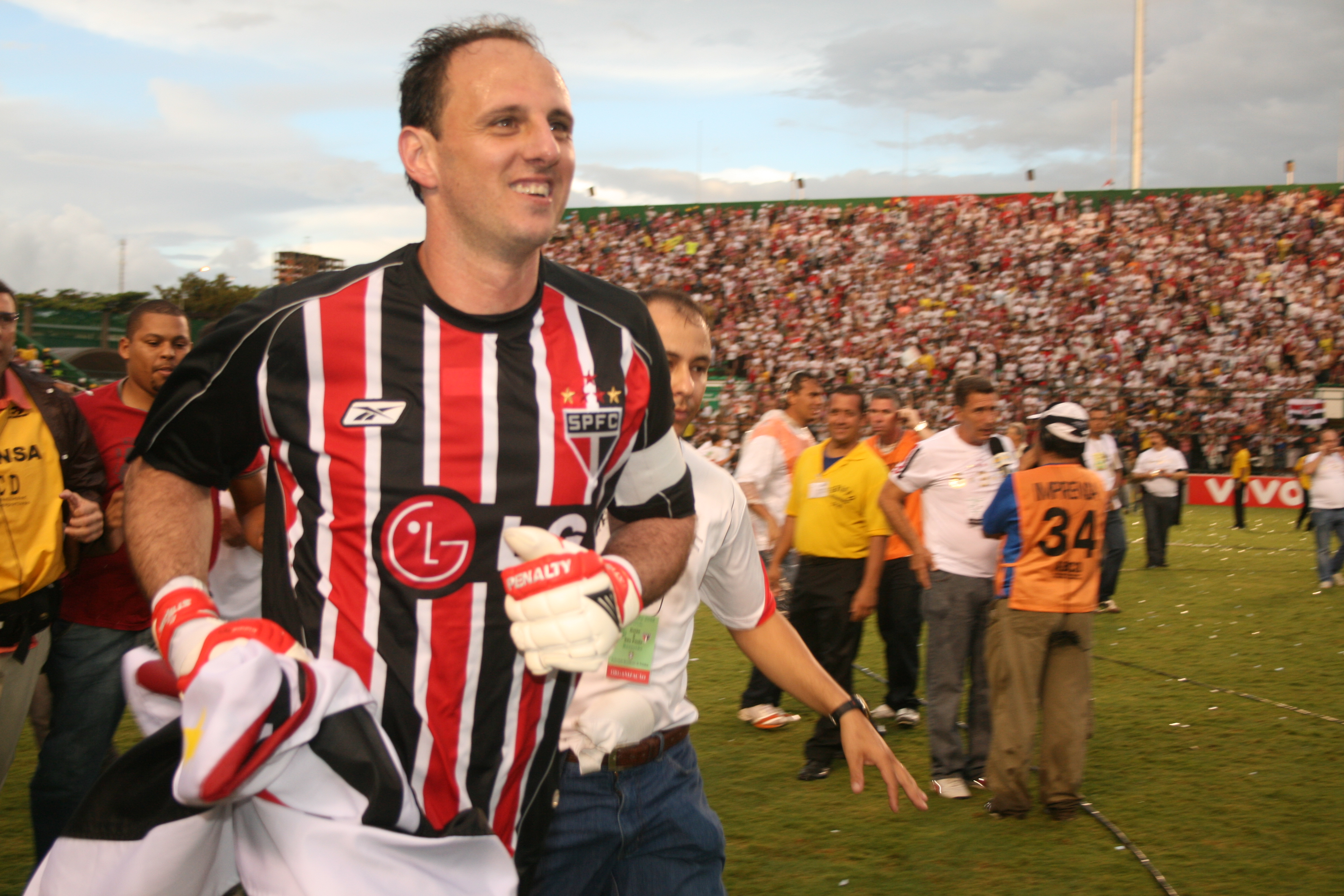 Foto do ex-goleiro do São Paulo Futebol Clube comemorando o tri-campeonato Brasileiro, conquistado em 2008. O registro foi feito em Brasília, no estádio Bezerrão, durante a última rodada do campeonato.